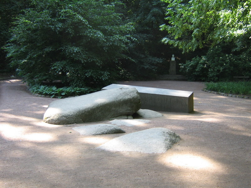 «Природа и искусство».